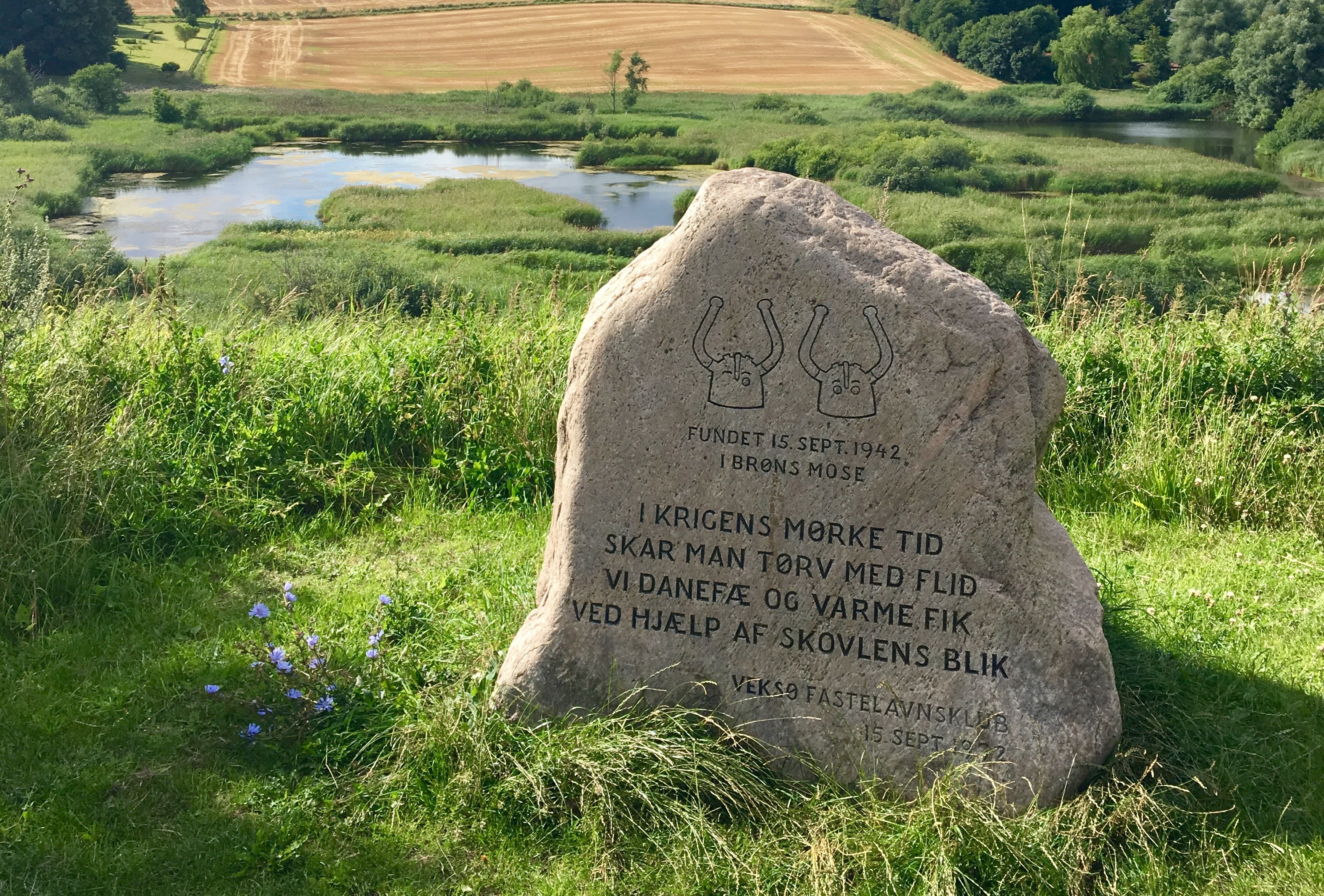 Mindesten for fundet af Veksøhornene ved Brøns Mose, Veksø